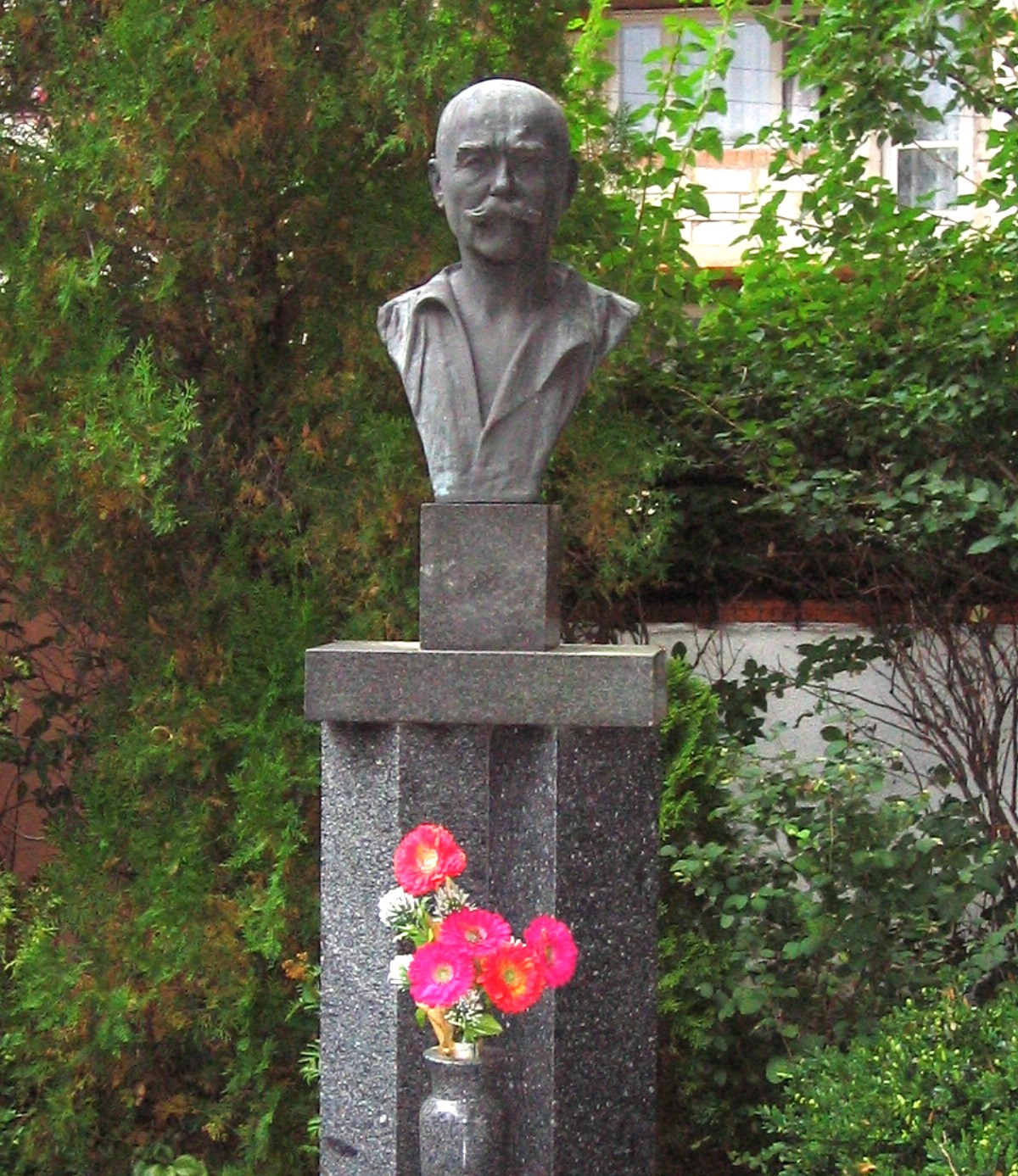 vlastní